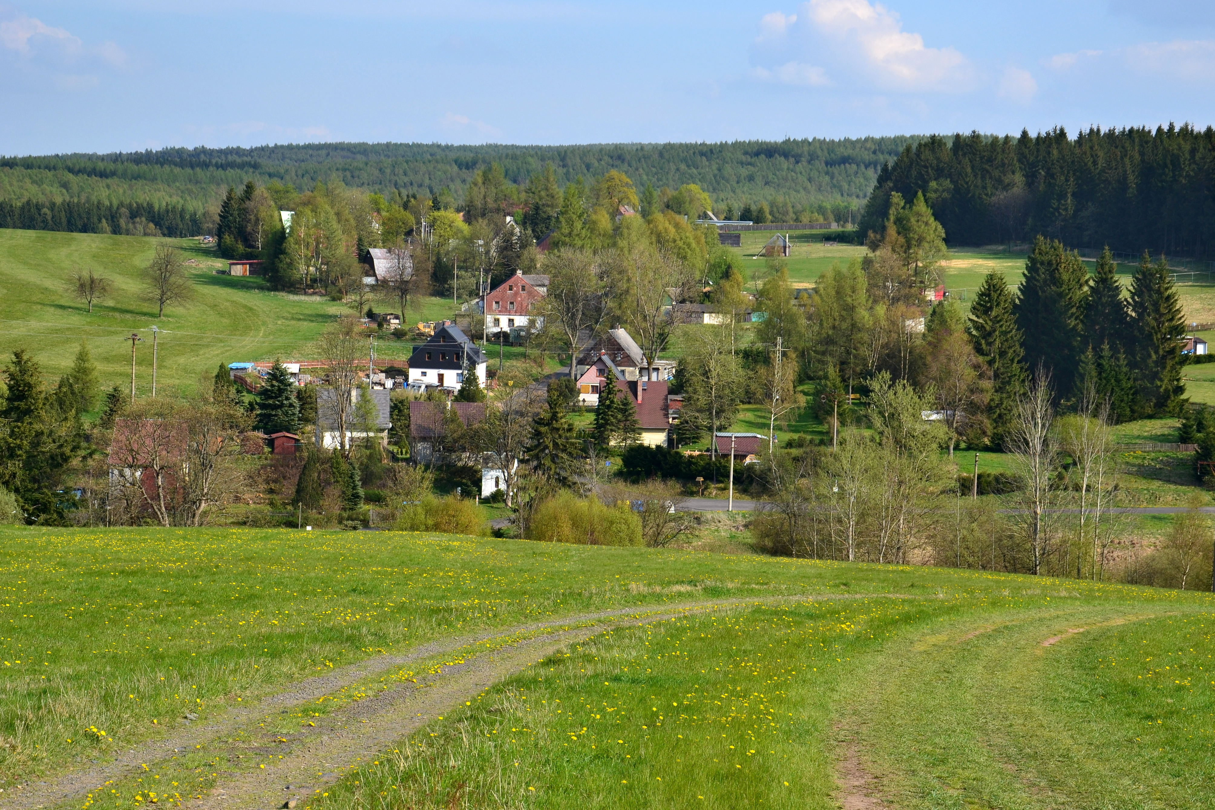 Východní část vesnice nad kaplí